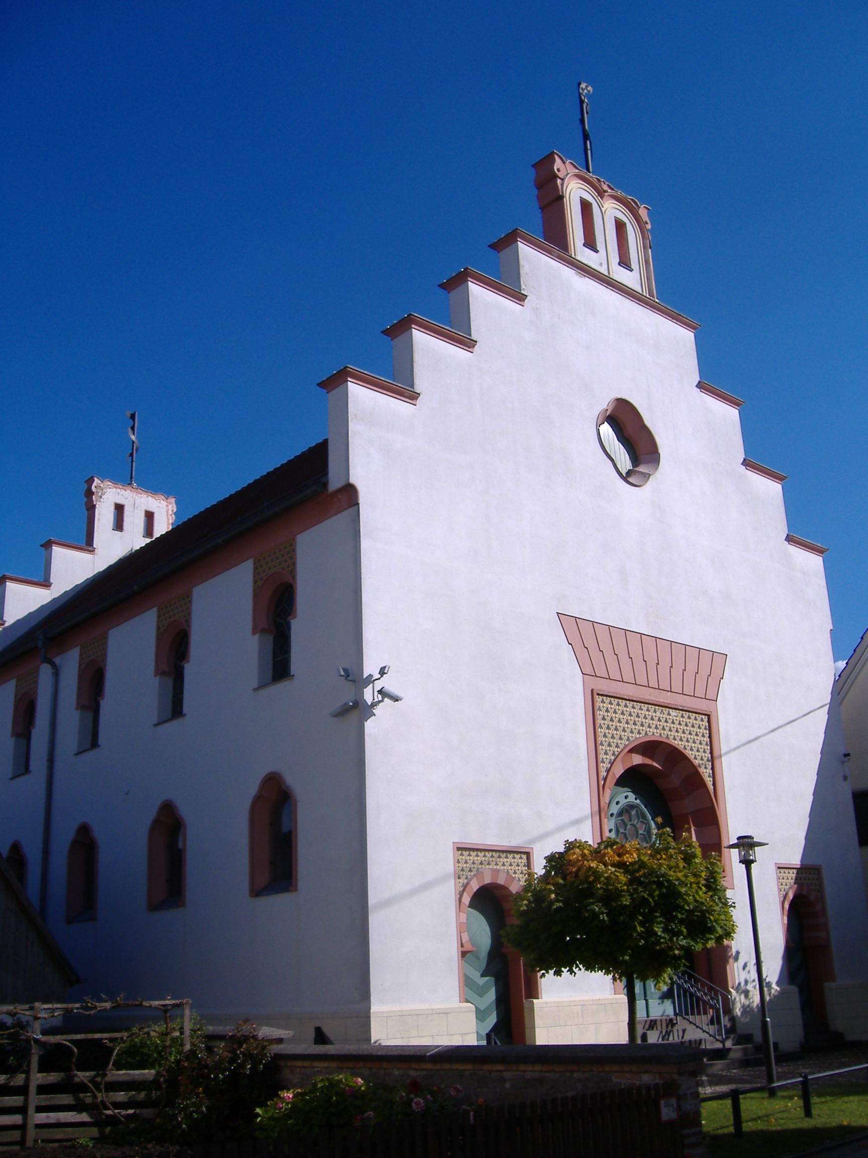 Binswangen